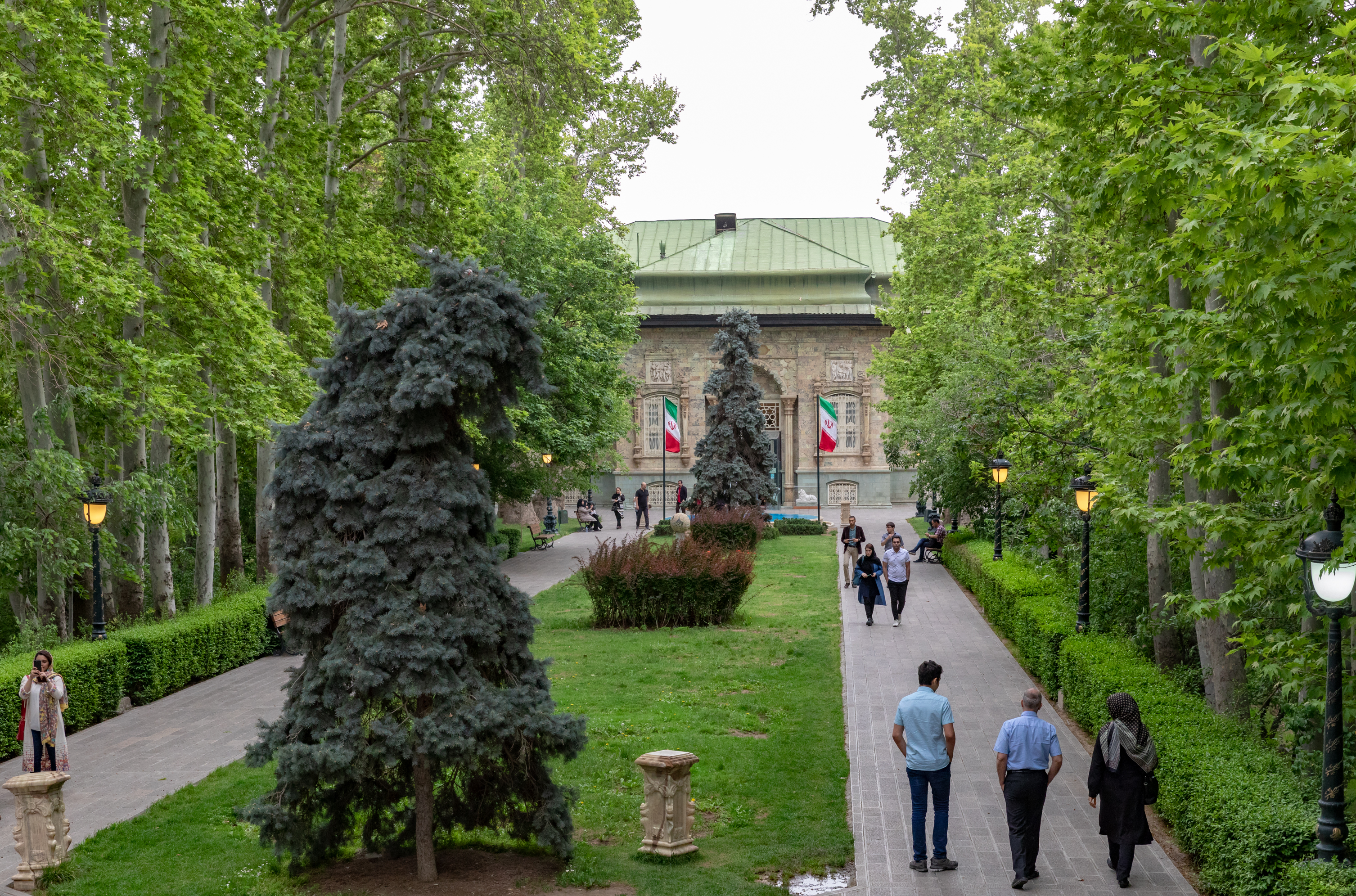 SaadAbad Palace, Tehran, Iran